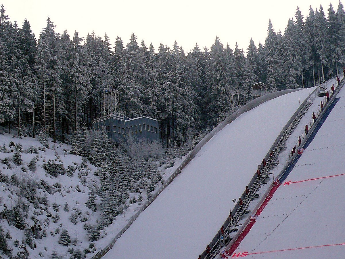 Kampfrichterturm der K 90, Schanze am Rennsteig, bei Oberhof